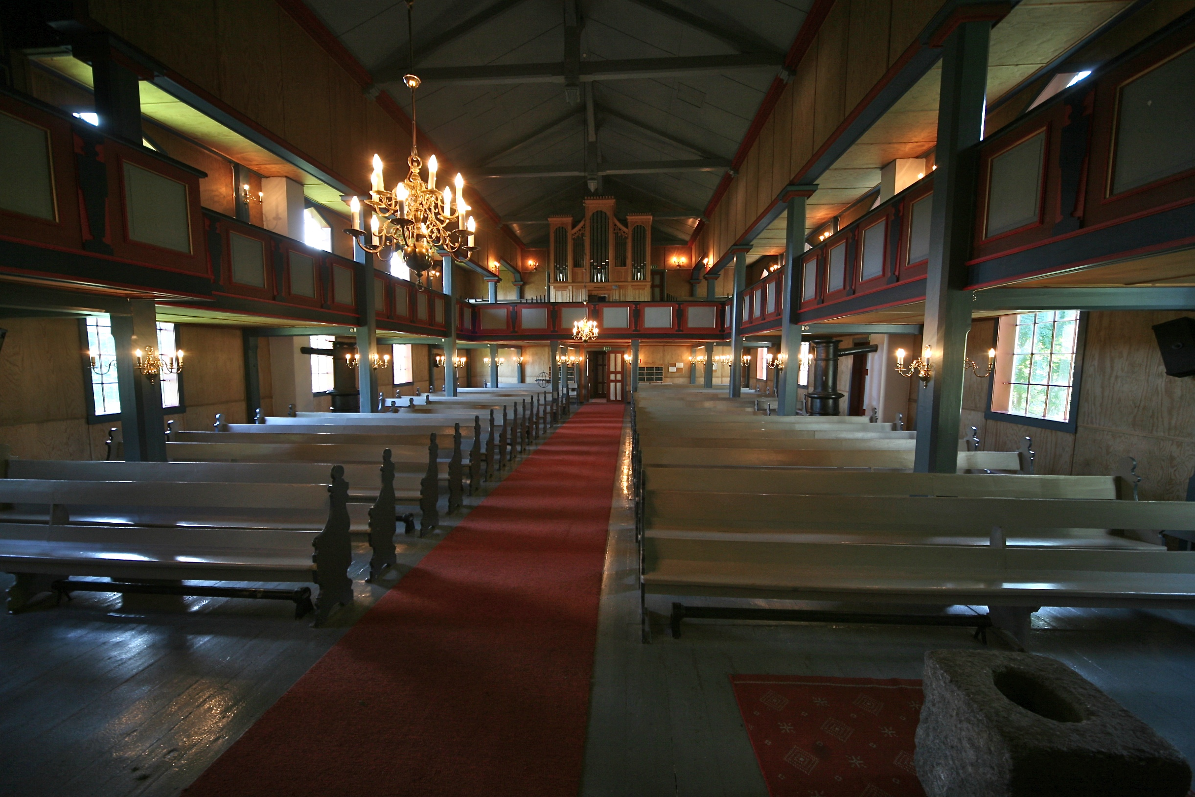 Gulen Kirke